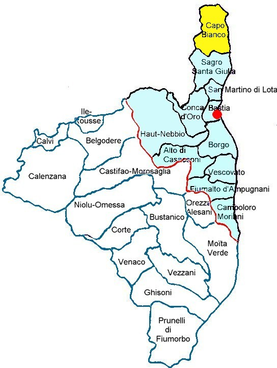 Localisation du canton de Capo-Bianco, Capicorsu, Haute-Corse